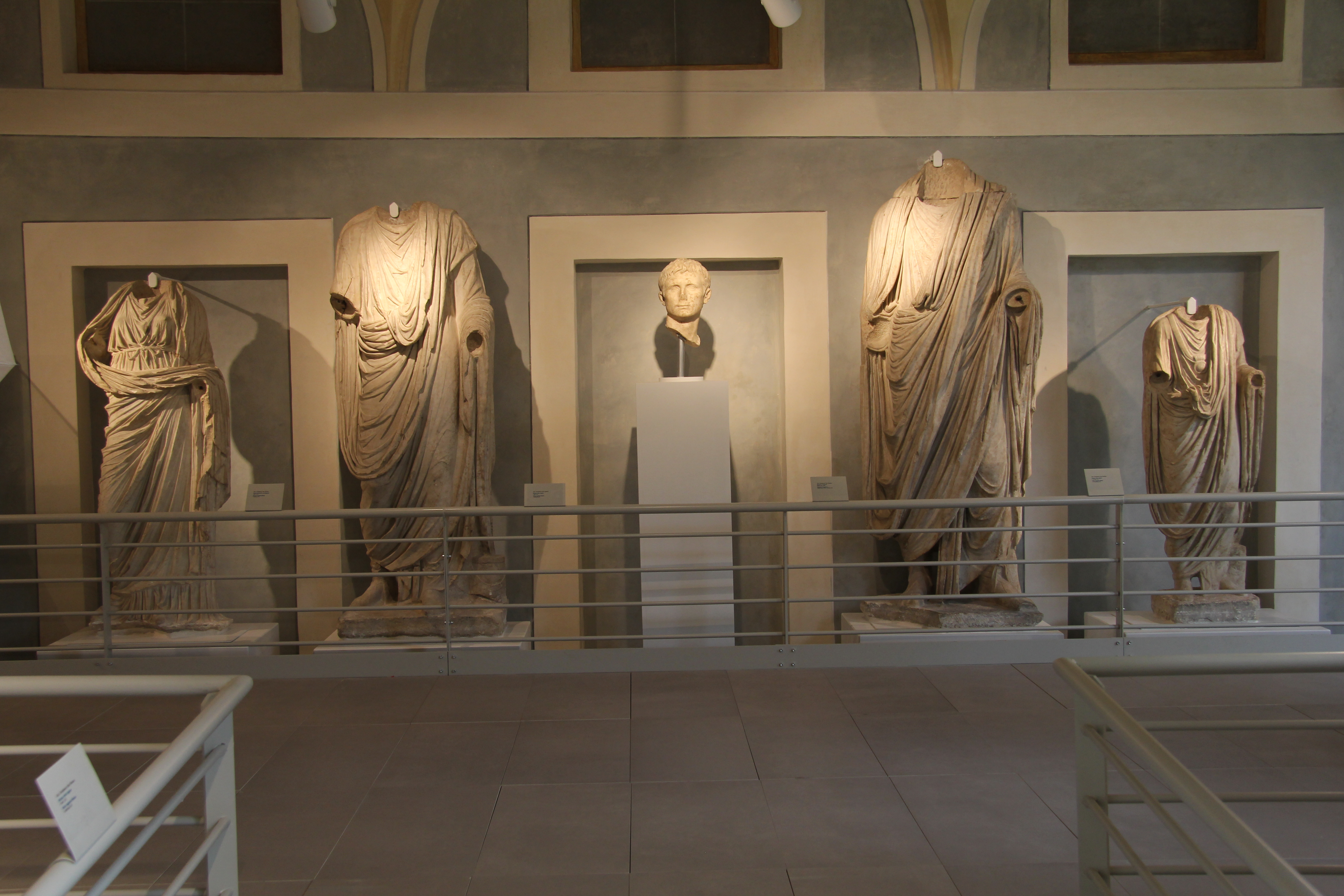 Il Museo archeologico espone un gruppo scultoreo formato da tre ritratti e sette statue risalenti alla prima età imperiale, dal tardo periodo augusteo all'età flavia (e forse anche a quella adrianea)